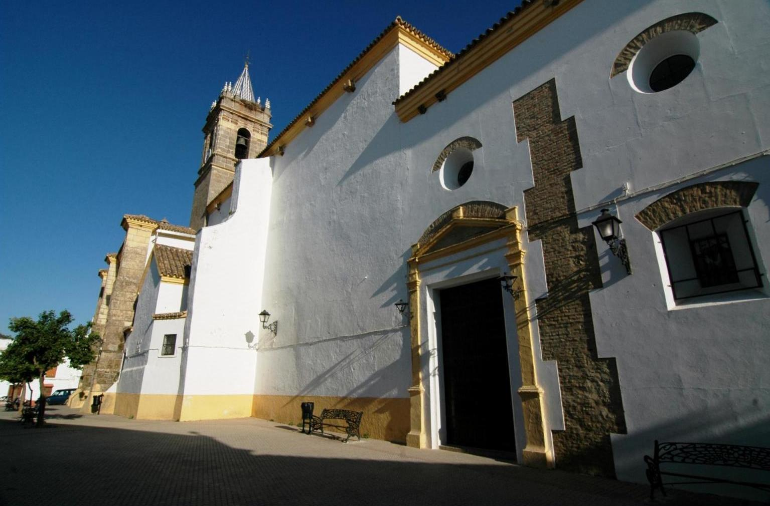 Iglesia de Nuestra Señora de la Consolación (El Pedroso) Sevilla, España.